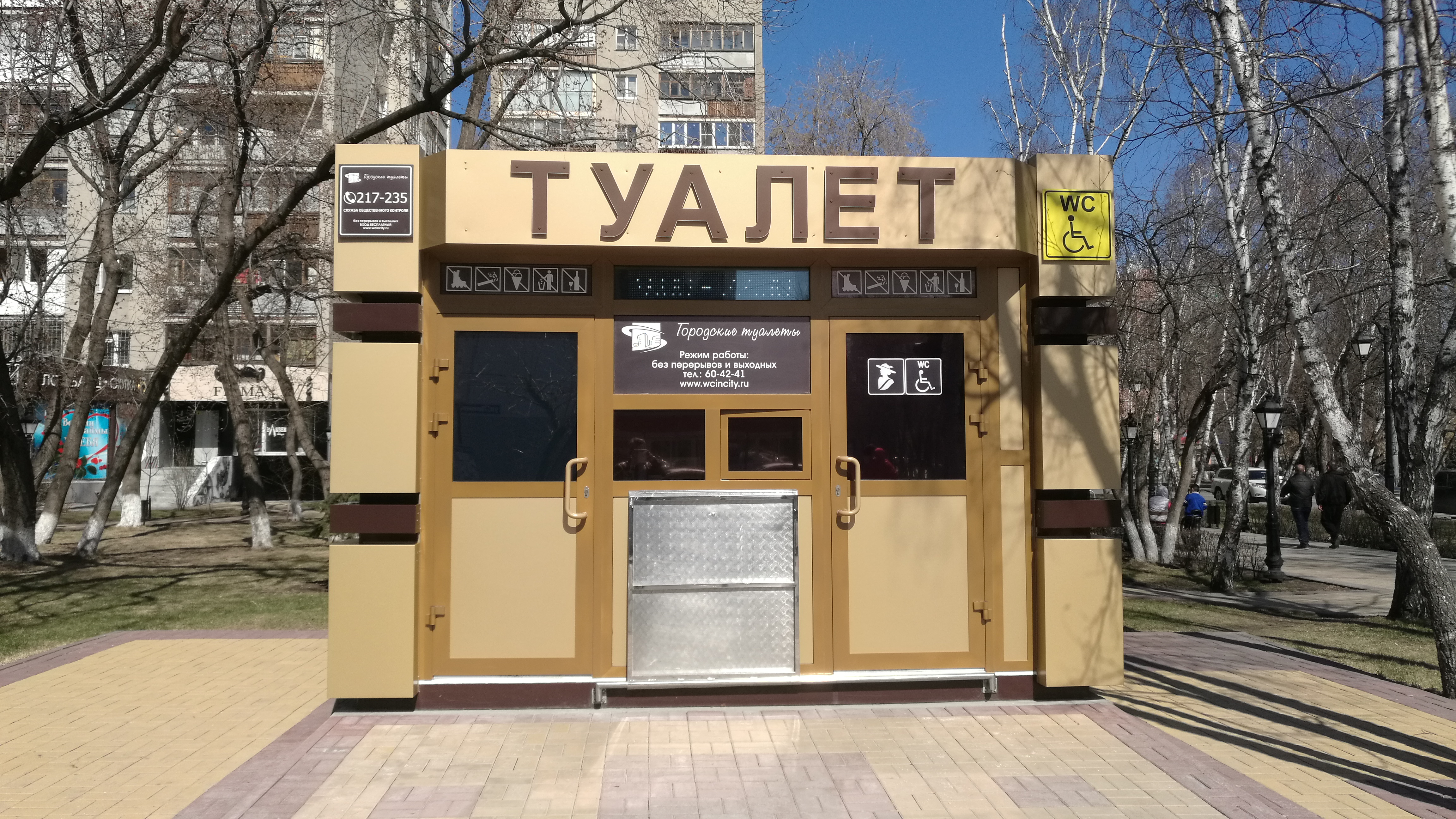 Strato Lenin. Tjumeno, Rusio.